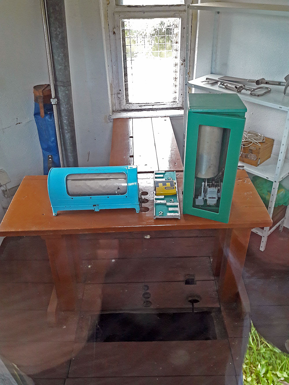 Pegelhaus Bad Düben Innenraum